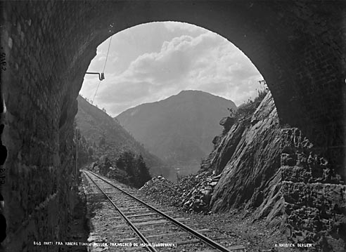 Parti fra Røberg mellem Trængereid og Vaxdal (Vossebanen)